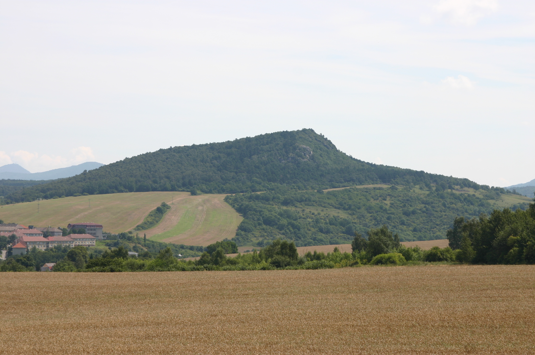 Kopec Kaňkov v okrese Most (od západu)